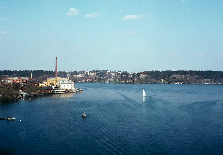 Från Tranebergsbron norrut mot Minnebergs industriområde och Ulvsundasjön.